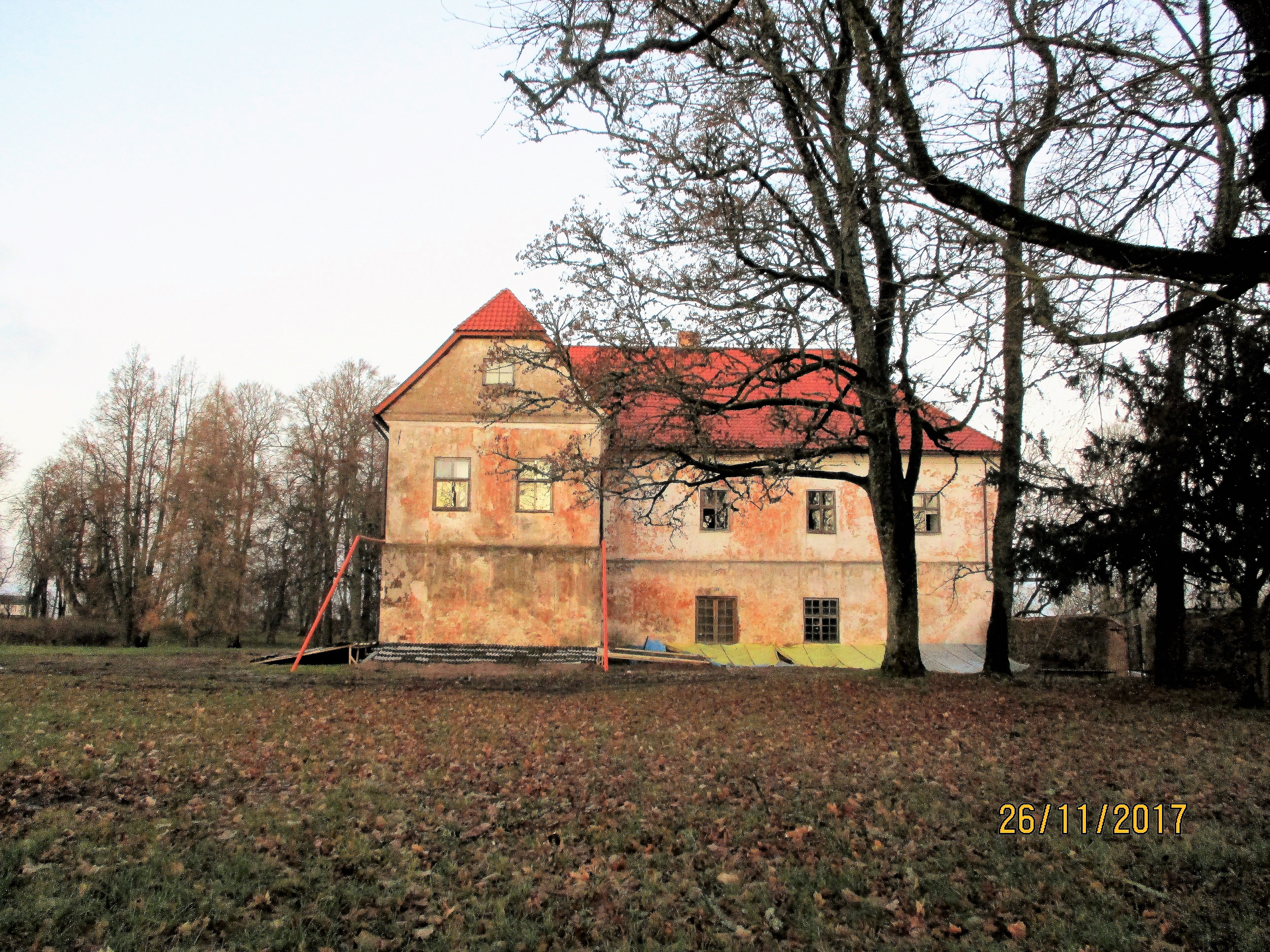 Linnusmõisa peahoone lõunaedelast.